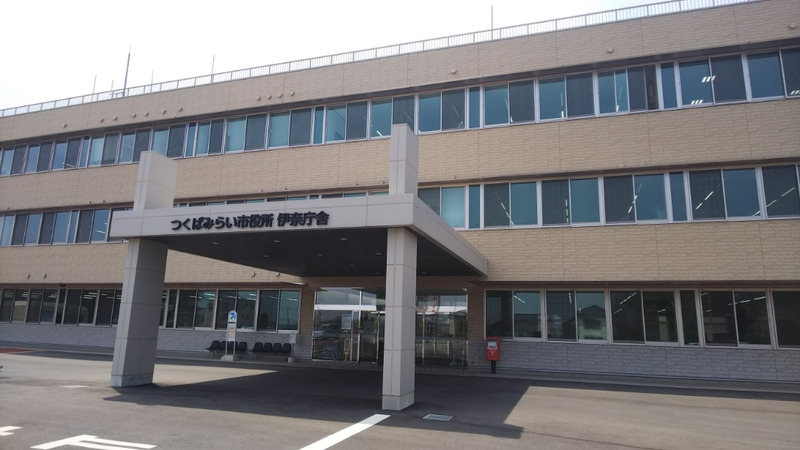 Nwe office